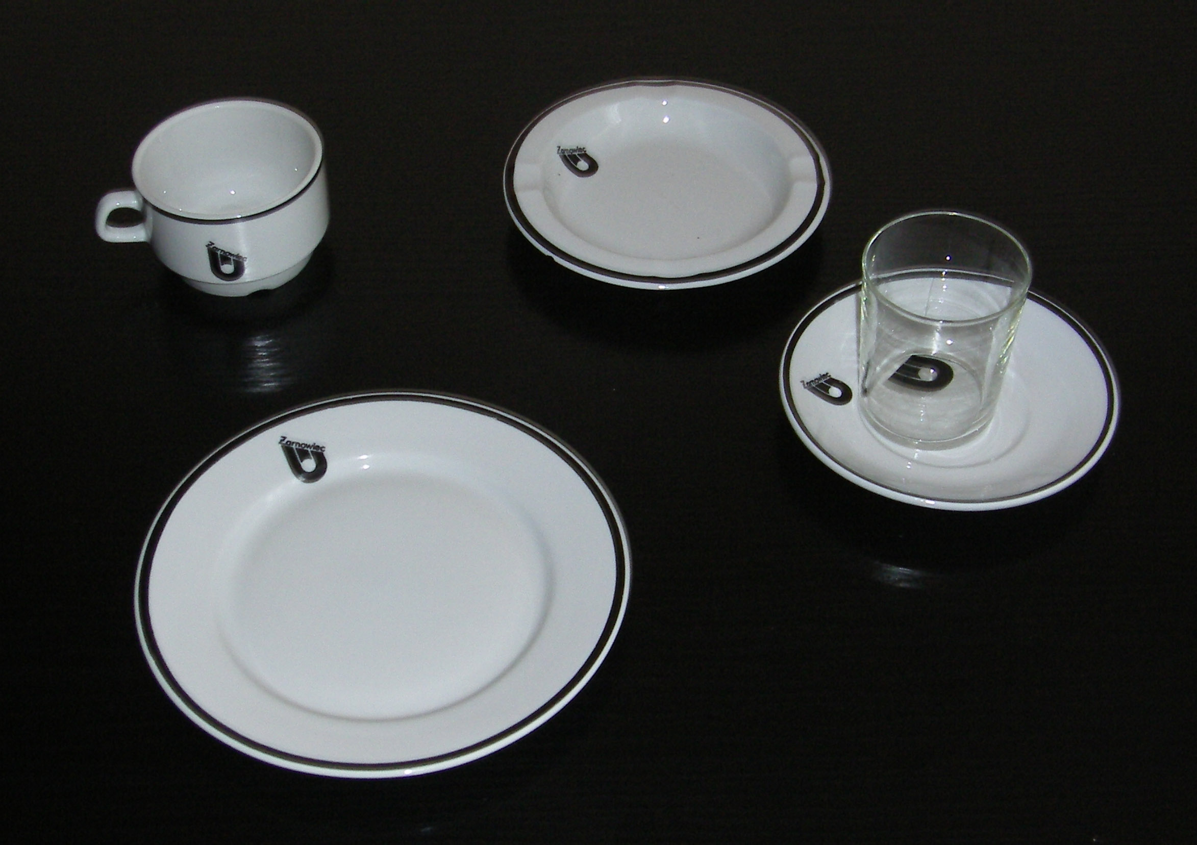 Część zastawy stołowej zakładów Lubiana z naniesionym logo Elektrowni Jądrowej Żarnowiec. Autorem zdjęcia jest Powolniak.